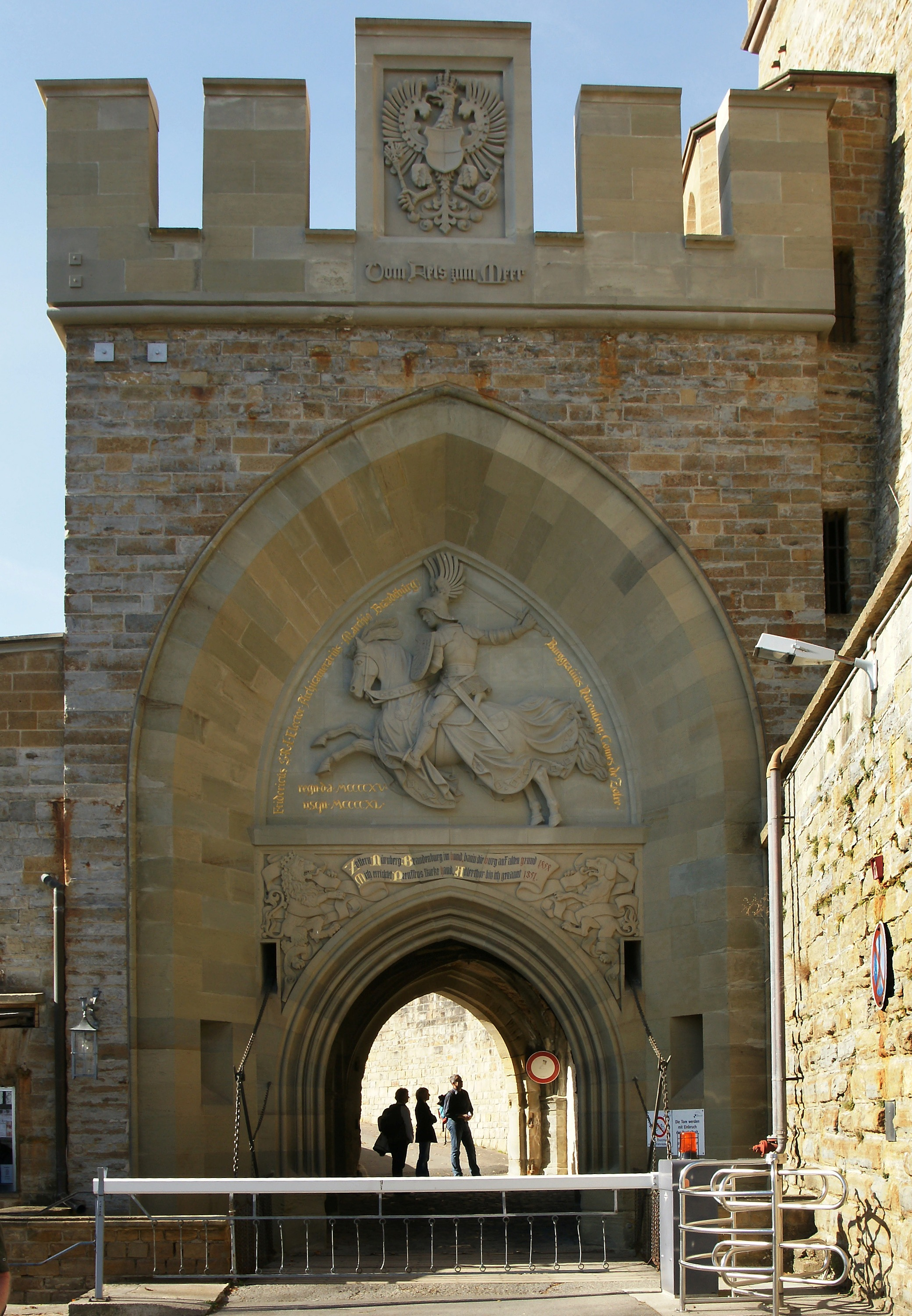 Das Adlertor der Burg Hohenzollern mit nachstehenden Inschriften: Wahlspruch des königlichen Hausordens von Hohenzollern: Vom Fels zum Meer. Im Spitzbogen Kurfürst Friedrich I. zu Ross: Fridericus S(acri) R(omani) I(mperii) Elector Archicamerarius Marchio Brandenburgensis Burggrauius Nürembergensis Comes de Zolre - Regnate d(e) a(nno) 1415, usque 1440 und auf dem Spruchband darunter: Zollern, Nürnberg, Brandenburg im bund, bauen die Burg auf alten grund 1454/ Mich errichtet Preussens starke hand, Adlertor bin ich genannt 1851.